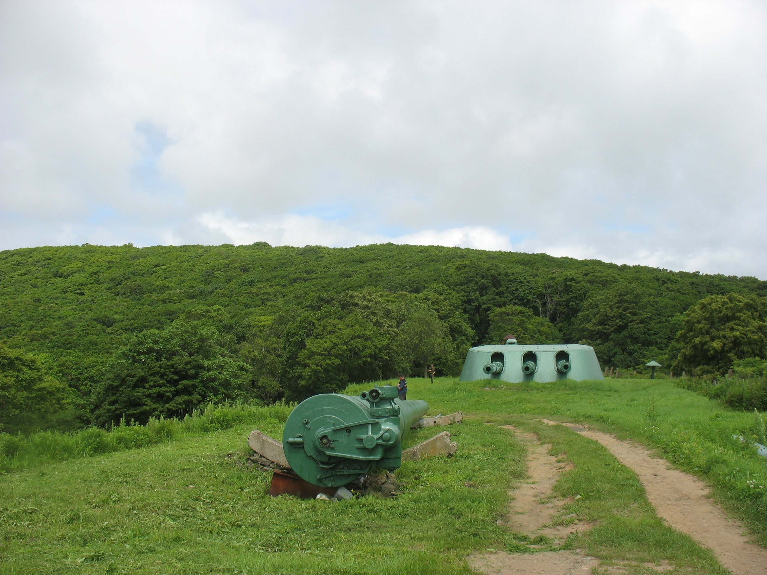 Ворошиловская батарея на о.Русском, Владивосток, Россия